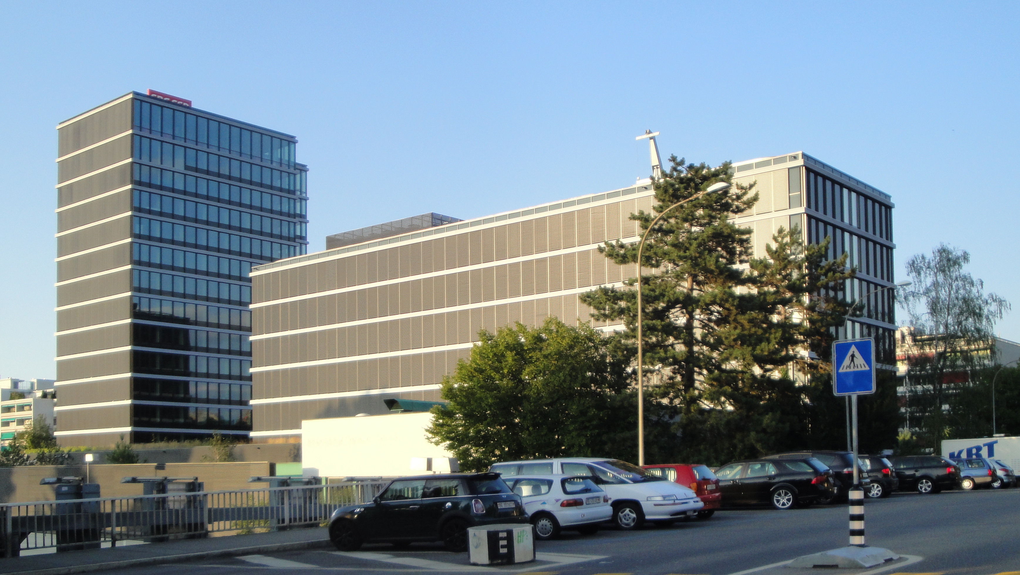 SRG SSR idée suisse Zentralarchiv der Generaldirektion